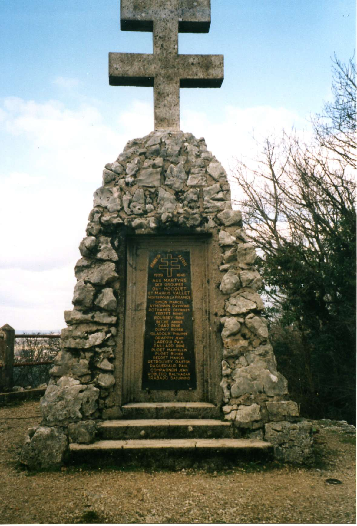 Stéle erigée à la mémoire des résistants fusillés à la citadelle de Besançon le 26 septembre 1943,à Aveney sur le belvédère du Rocher de Valmy, en limite de la commune de Larnod. (Photos J L)